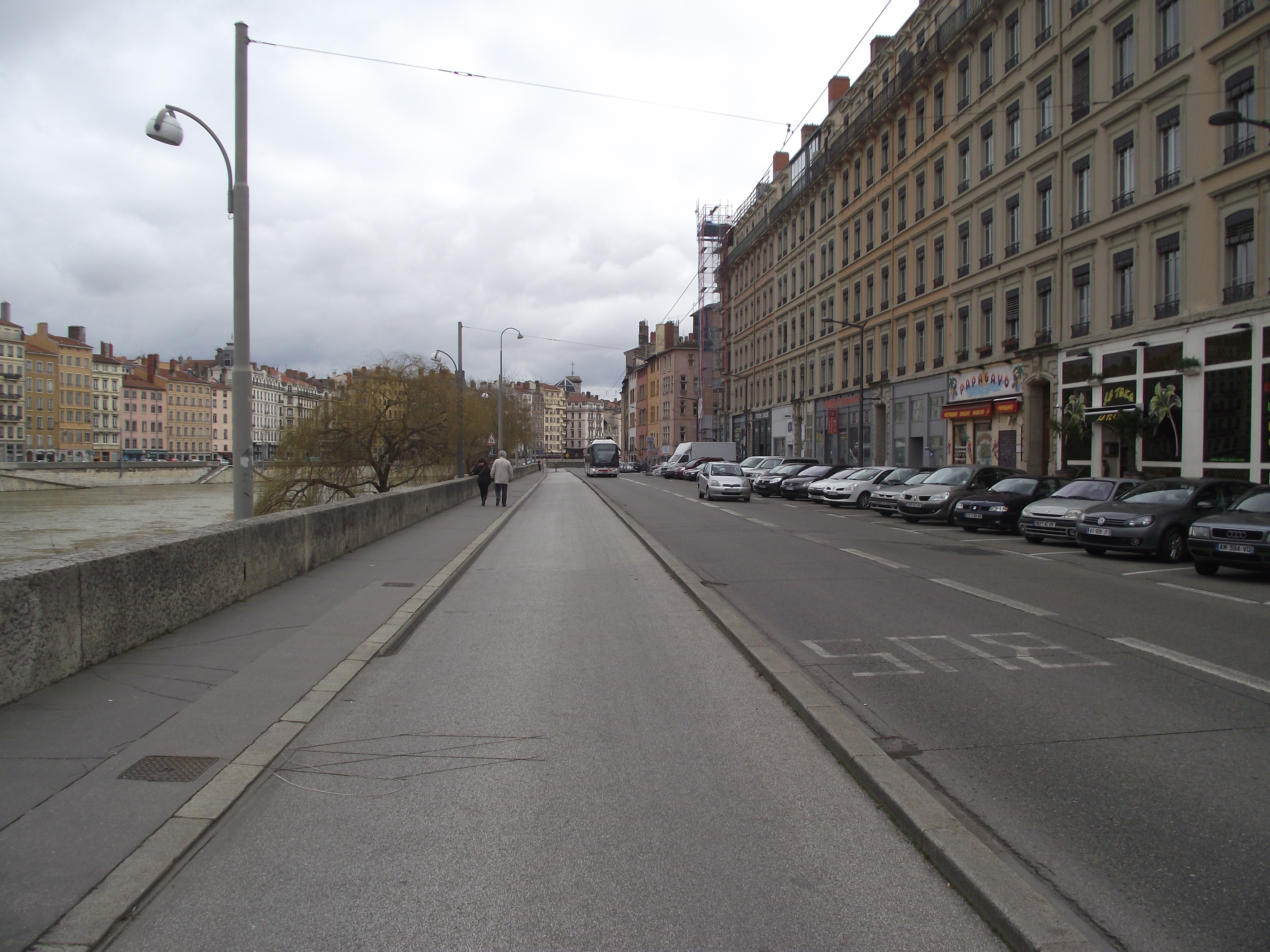 Trolleybus op busbaan bij Quai Pierre Scize